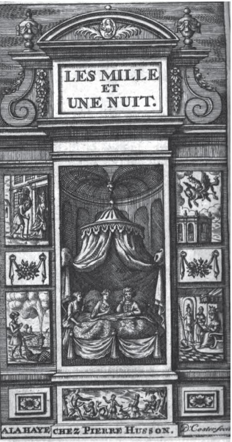 Illustration from The Arabian Nights by Dutch artist David Coster: Shahrazad tells her story to Shahryar, while her sister Dunyazad is listening. Plus other stories in the smaller frames, like "The ebony horse" and "The fisherman and the jinn".